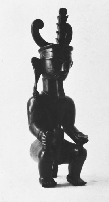 Foto. Een houten beeld gemaakt door Rudolf Bonnet tijdens zijn verblijf op Nias